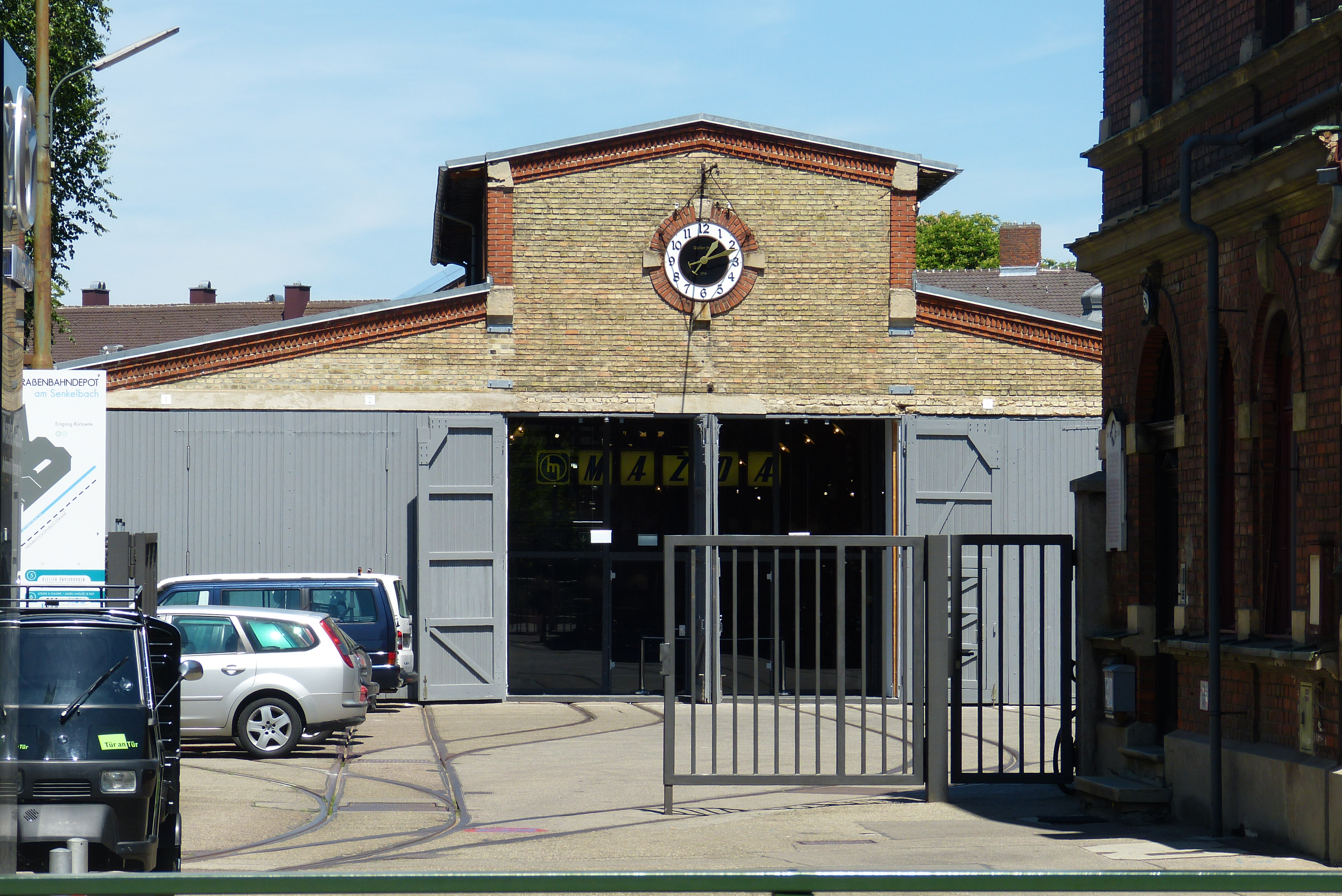 Ehemalige Städtische Straßenbahnzentrale; Wagenhalle. Zukünftig Mazda-Museum This is a photograph of an architectural monument.